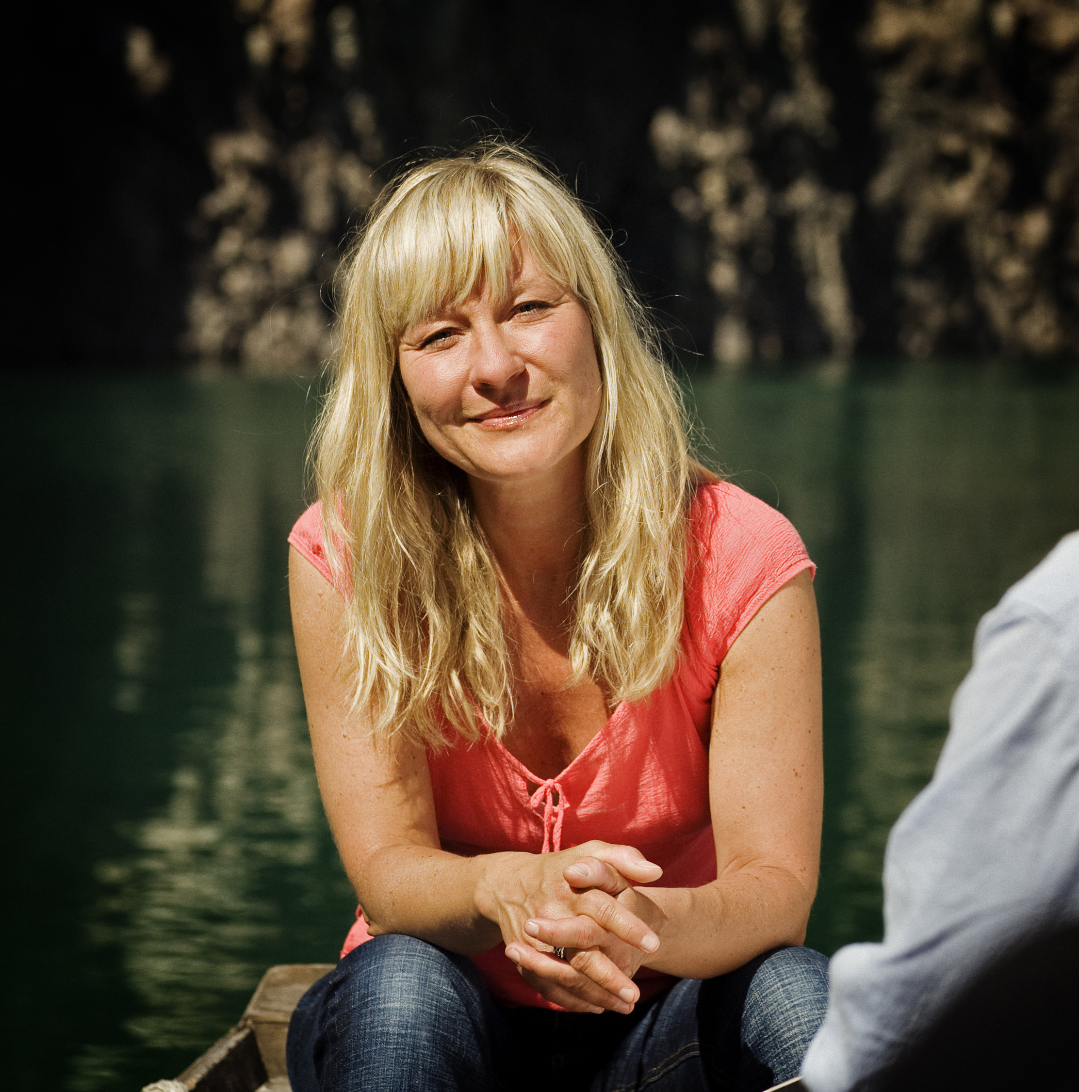 Lena Willemark, svensk sångerska, riksspelman och kompositör.